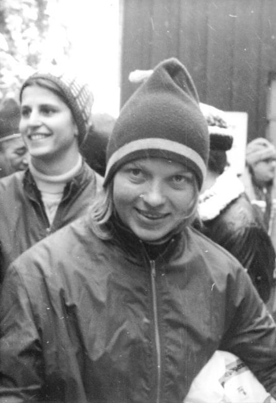 Margit Schumann ADN-ZB Mittelstädt hf-19.1.1974-Bez. Suhl: DDR-Rennschlittenmeisterschaften 1. Serie am 19.1.1974 in Oberhof-Nach den beiden ersten Wertungsläufen führt bei den Damen-Einsitzern Margit Schumann vom ASK Oberhof. Die Weltmeisterin bewältigte beide Fahrten in einer Gesamtzeit von 1:29,93 min.